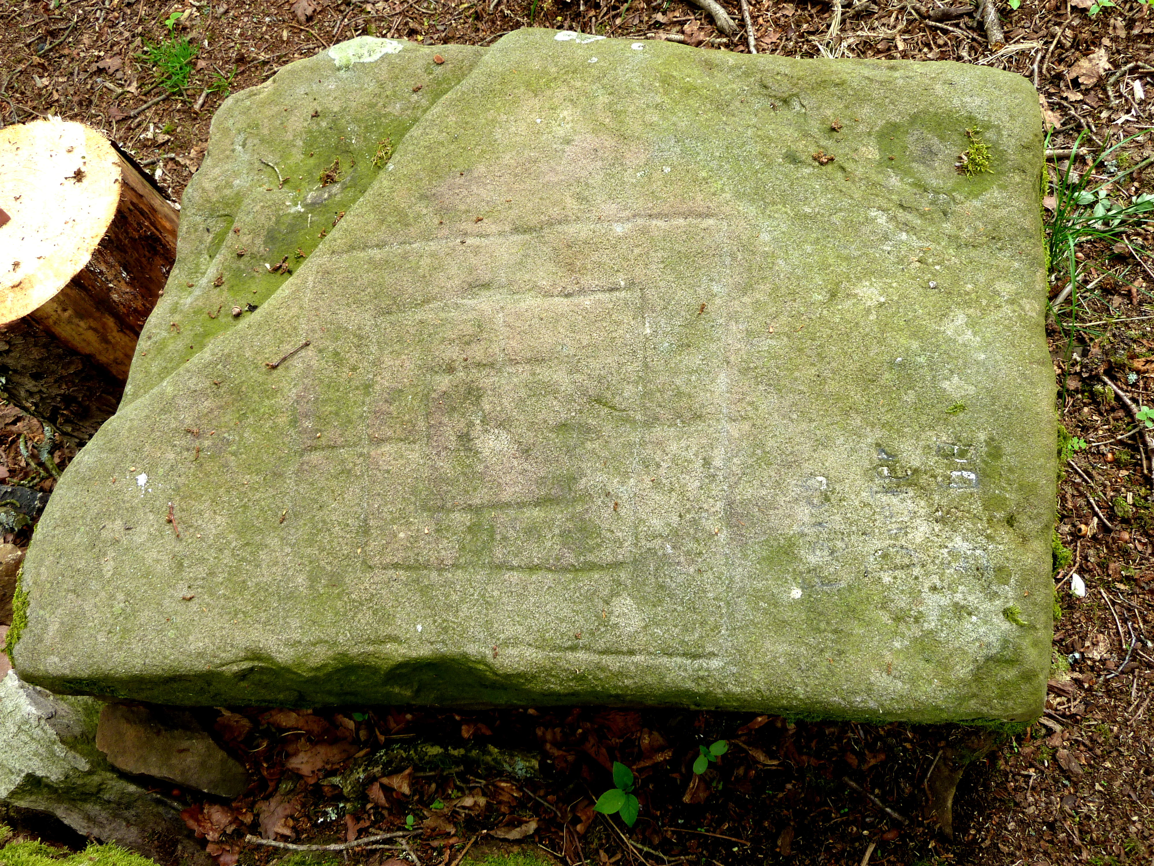 Blick von oben auf den Bredenstein, einen Zeichenstein im Solling auf den Derentaler Wiesen nahe der Ahlequelle. Einritzung auf der Oberseite in Form eines Mühlespiels. Datierung und Bedeutung ungeklärt.